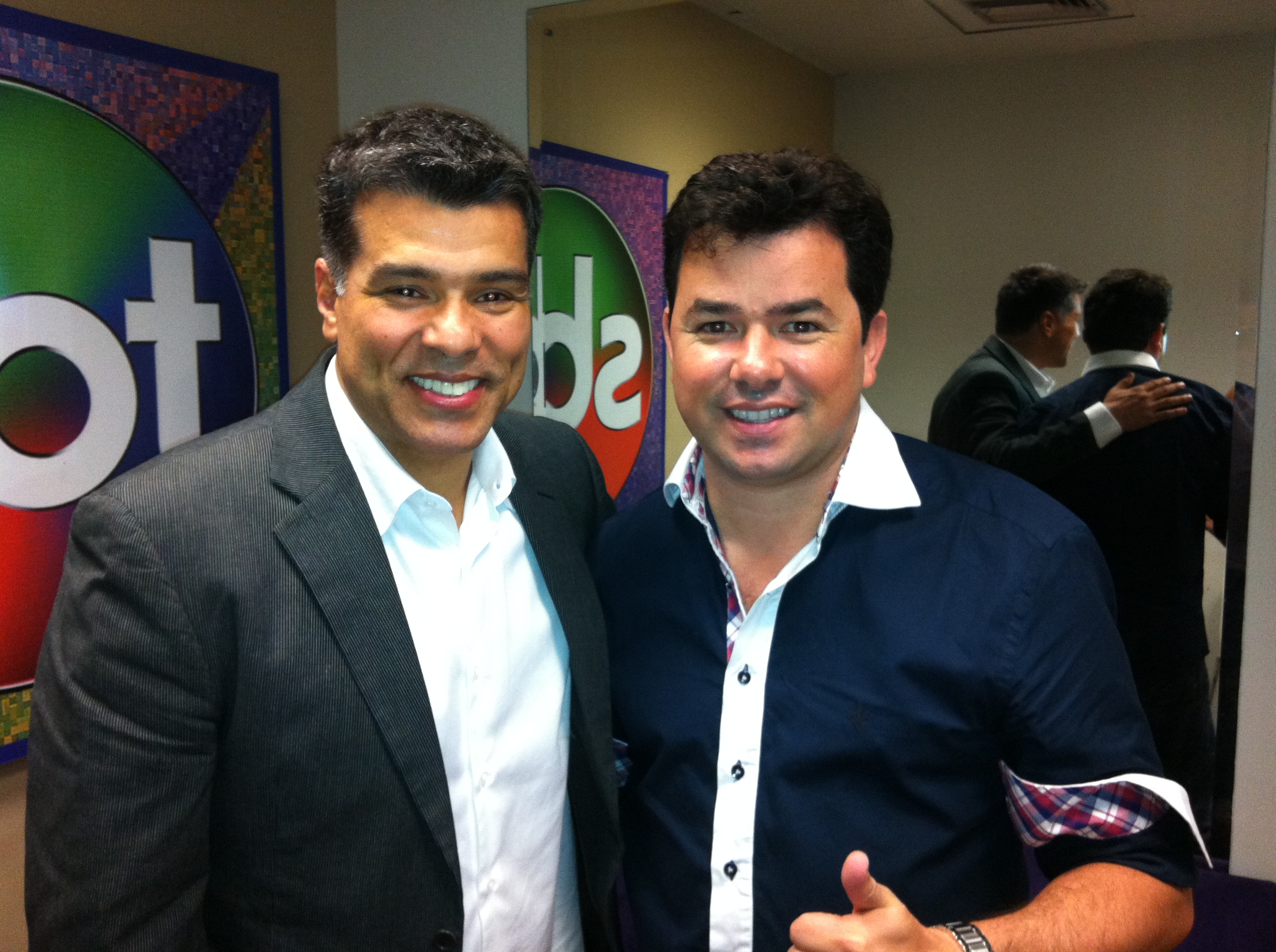 Zezinho Gasolina fotografado com o ator Maurício Mattar em um dos estúdios de gravações do SBT